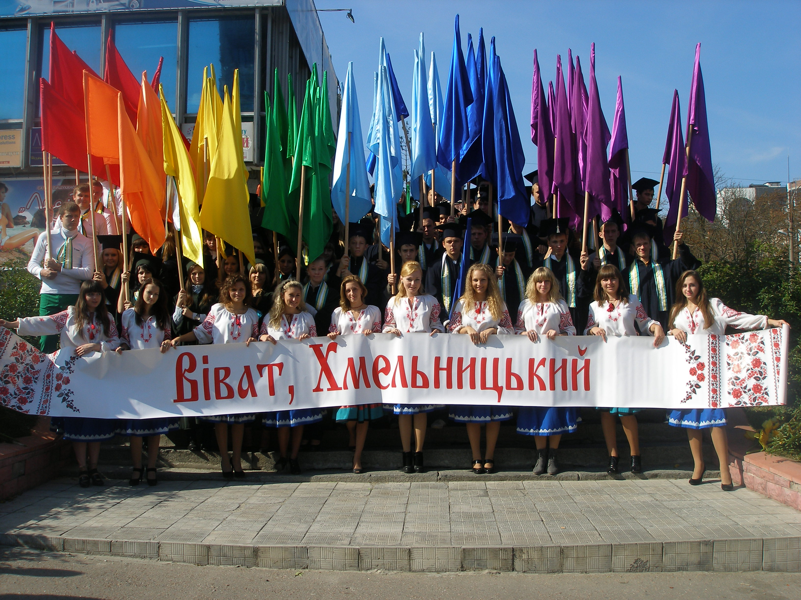 Святкова колона студентів ХКТЕІ на урочистостях з нагоди Дня міста Хмельницького